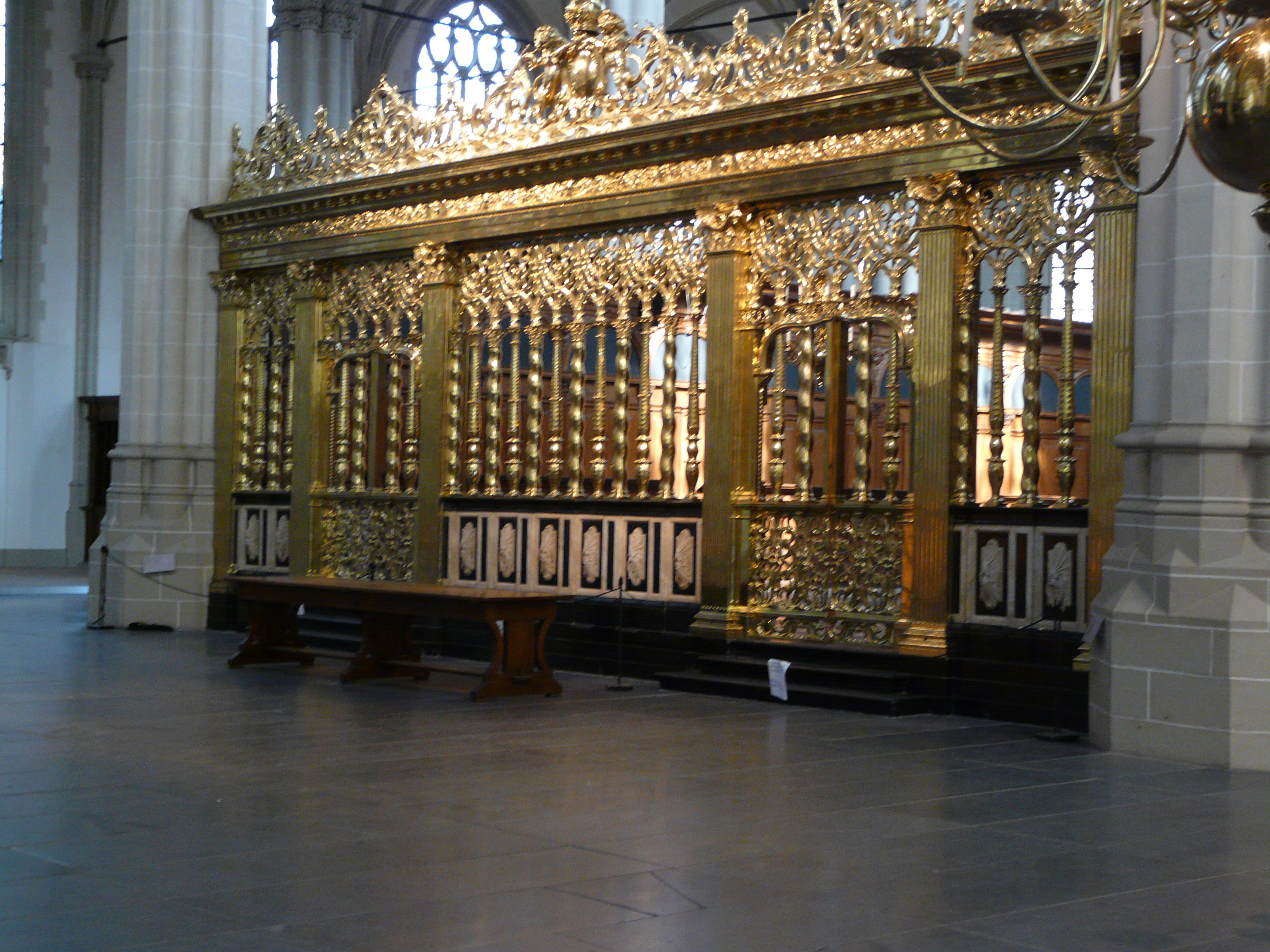 Koorhek in de Nieuwe Kerk in Amsterdam.